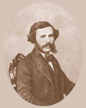 Колбасин, Елисей Яковлевич